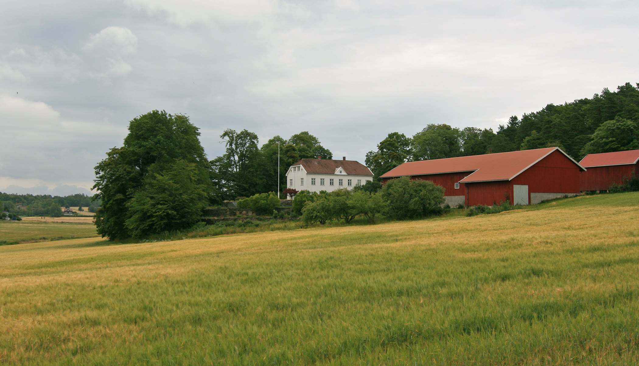 Brekke gård, Tjølling, Larvik. Freda hovedbygning.